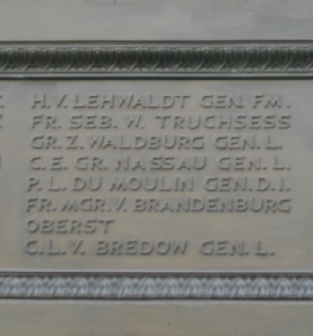 Reiterstandbild - Friedrich der Große - Nordansicht ( Details ) unten - Namenstafel - halblinks H. V. LEHWALDT GEN. FM. ----------- Johann von Lehwaldt FR. SEB. W. TRUCHSESS GR.Z. WALDBURG GEN.L. ---- Friedrich Sebastian Wunibald Truchsess zu Waldburg C.E. GR. NASSAU GEN.L. ------------- Ernst Christoph von Nassau P.L. DU MOULIN GEN.D.I ------ Peter du Moulin FR.MGR. V. BRANDENBURG OBERST ---- Friedrich von Brandenburg-Schwedt C.L. V. BREDOW GEN.L. ---------- Kaspar Ludwig von Bredow Quelle der Links : wiki Berlin - Unter den Linden ( Mittelpromenade ) Baudenkmal ( LDA ) Landesdenkmalamt - Berlin Dok Nr. 09060118 LDA Info wiki Reiterstandbild Friedrichs des Großen